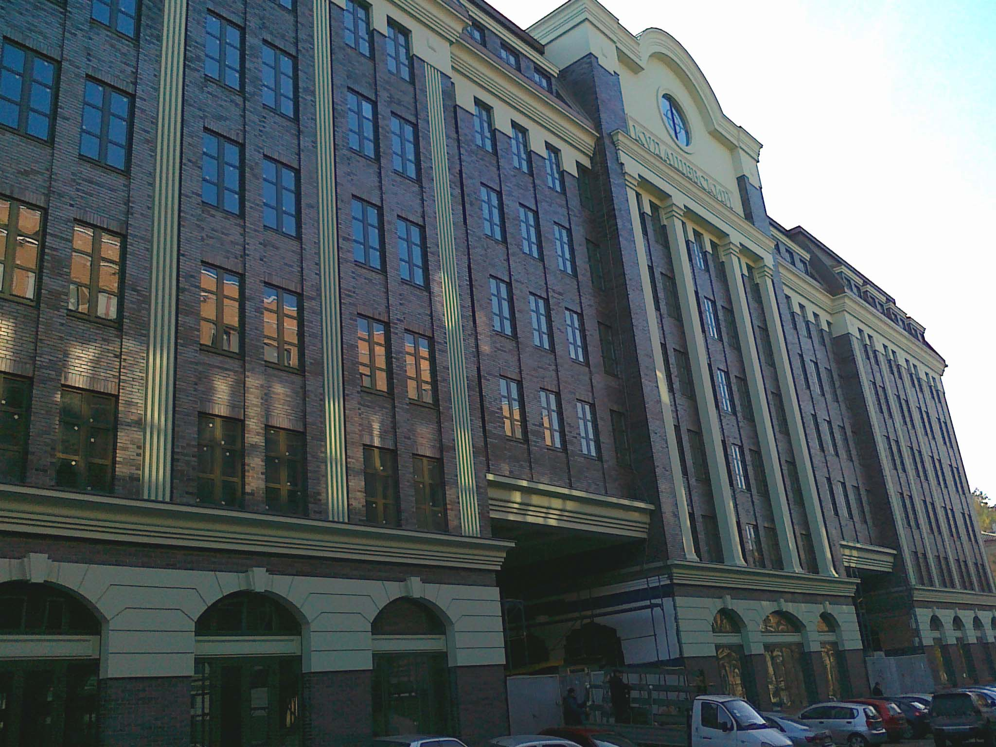 "Кудашевский". Еще один торгово-деловой центр. Октябрь 2010. Завершающие этапы строительства. / Kudashevskiy. One more trade and business center in the final stages of construction. October 2010. Located at Barrikadna street, 10.